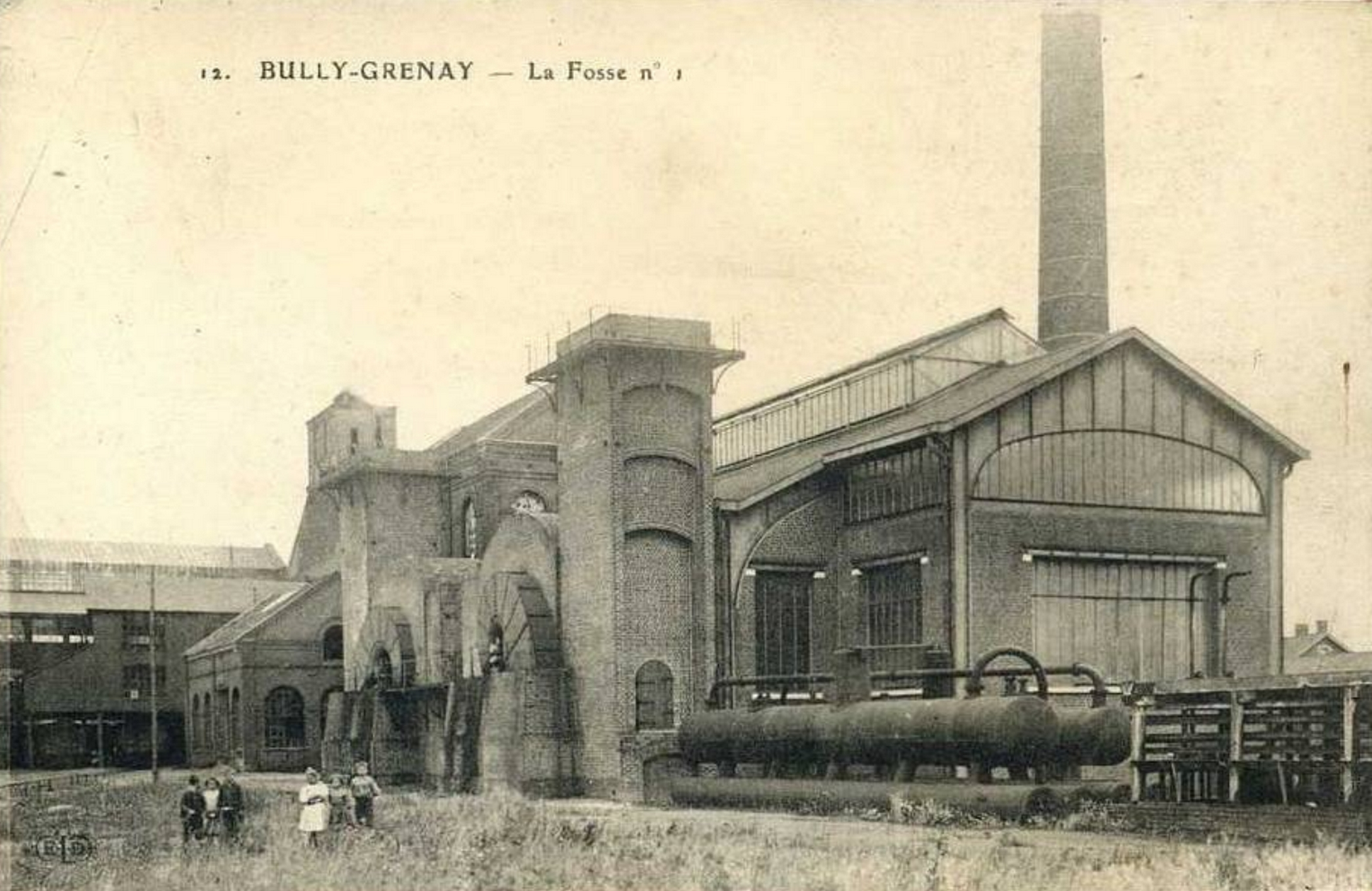 La fosse n° 1 - 1 bis - 1 ter de la Compagnie des mines de Béthune était un charbonnage constitué de trois puits situé à Bully-les-Mines, Pas-de-Calais, Nord-Pas-de-Calais, France.